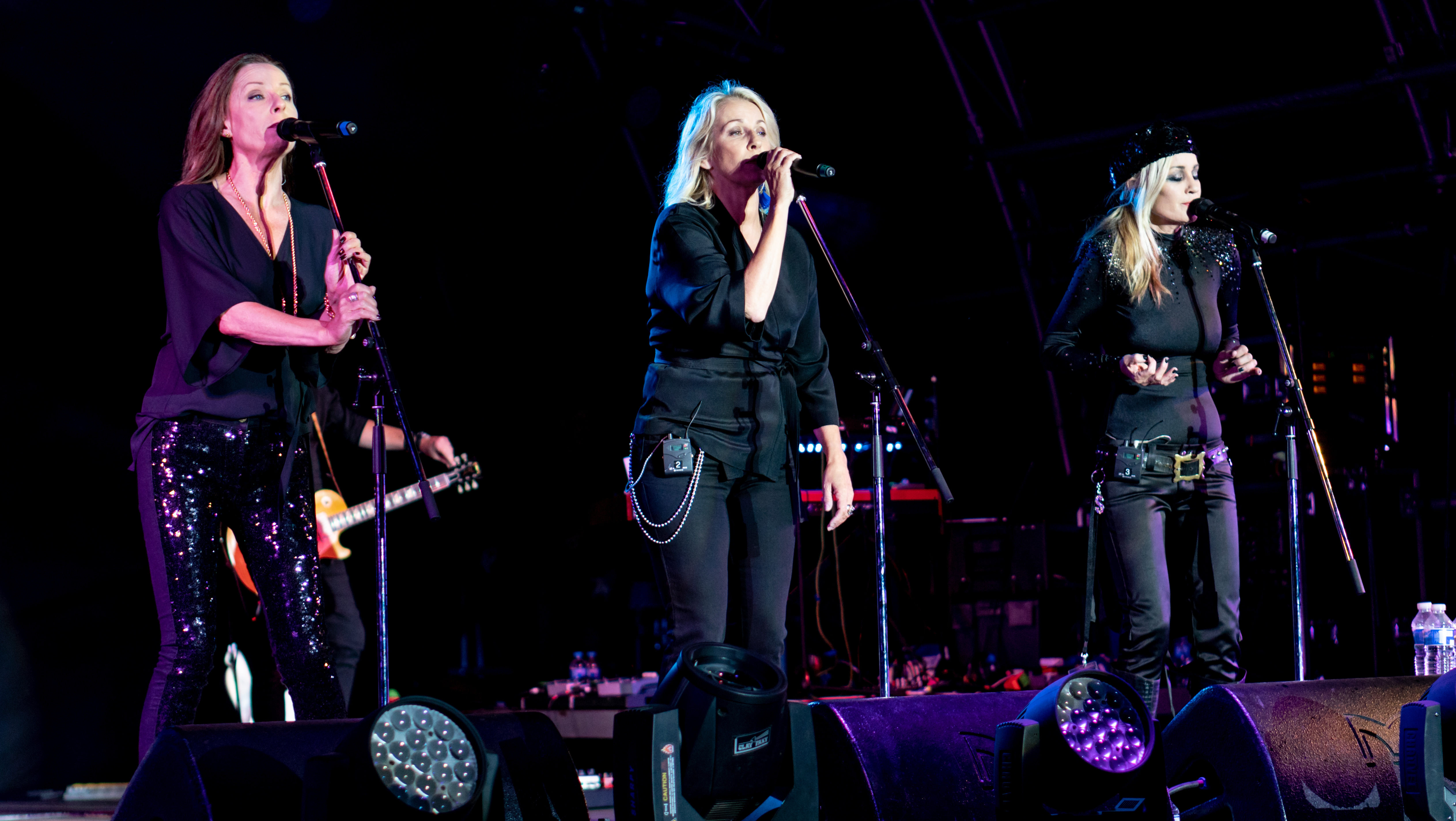 BanaRamaAmpthill290618-32